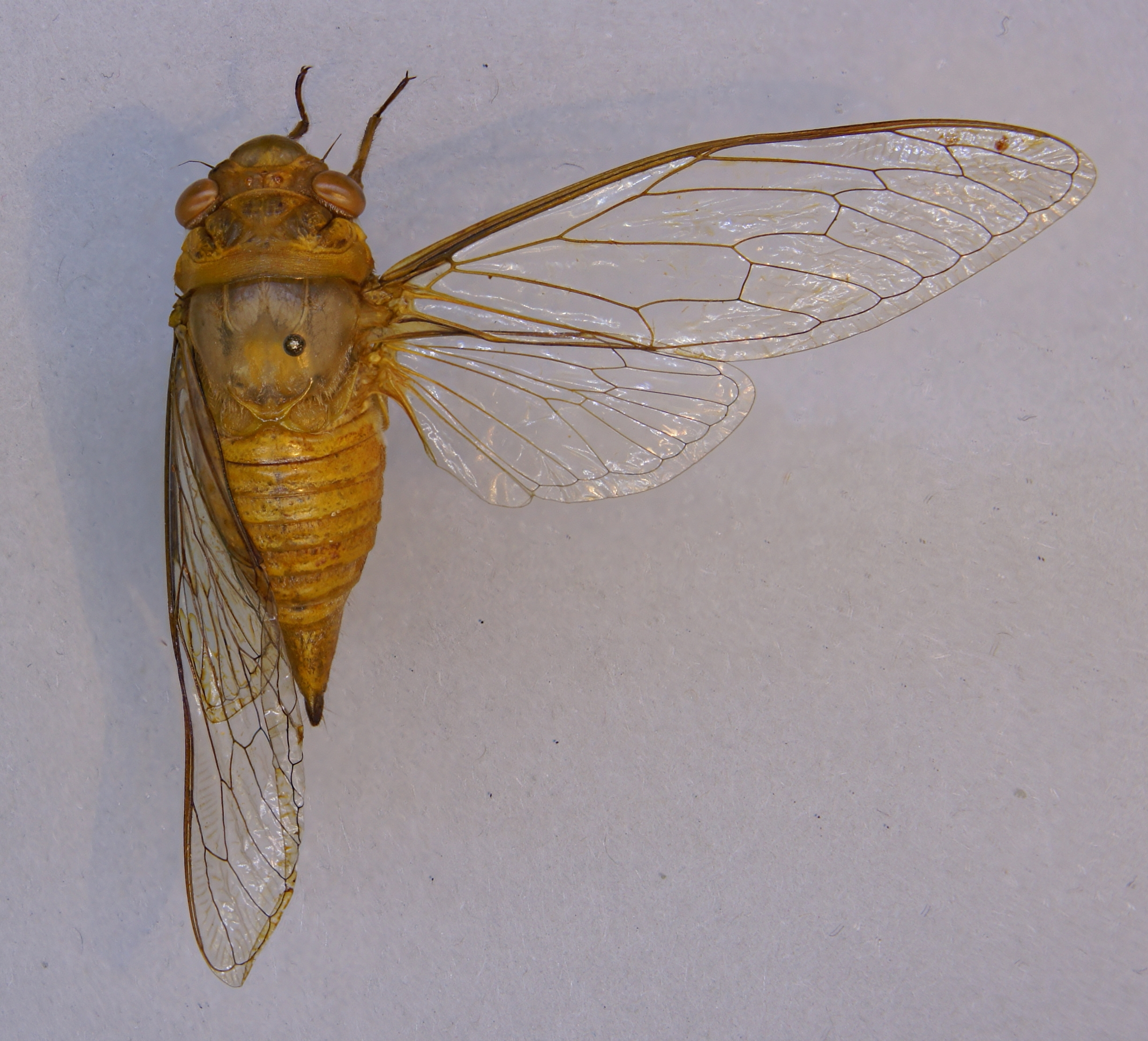 Dundubia euterpe (Bloem&Duffels, 1976) Herkunft: Indonesien, West-Sumatra, Rimbo Panti